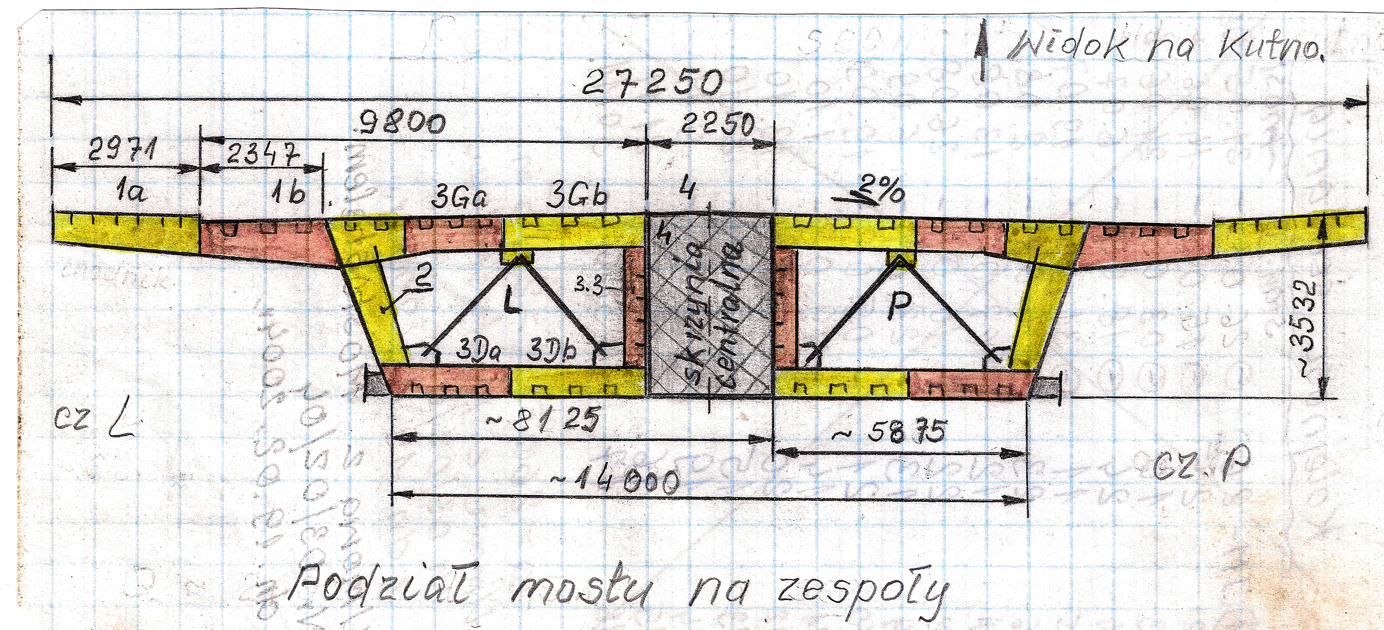 Skan pierwszego, sporządzonego "na brudno" rysunku podziału Mostu Solidarności w Płocku przez Wisłę - mostu głównego (nurtowego) na zespoły jako mostu zaprojektowanego o połączeniach spawanych autorstwa mgr inż. Ireneusza Wyrzykowskiego. Według idei przedstawionej na tym rysunku, opracowano projekt, a następnie wykonano most główny (nurtowy) o połączeniach spawanych, zastępując nim projekt pierwotny, zakładający wykonanie mostu o połączeniach na śruby sprężające.